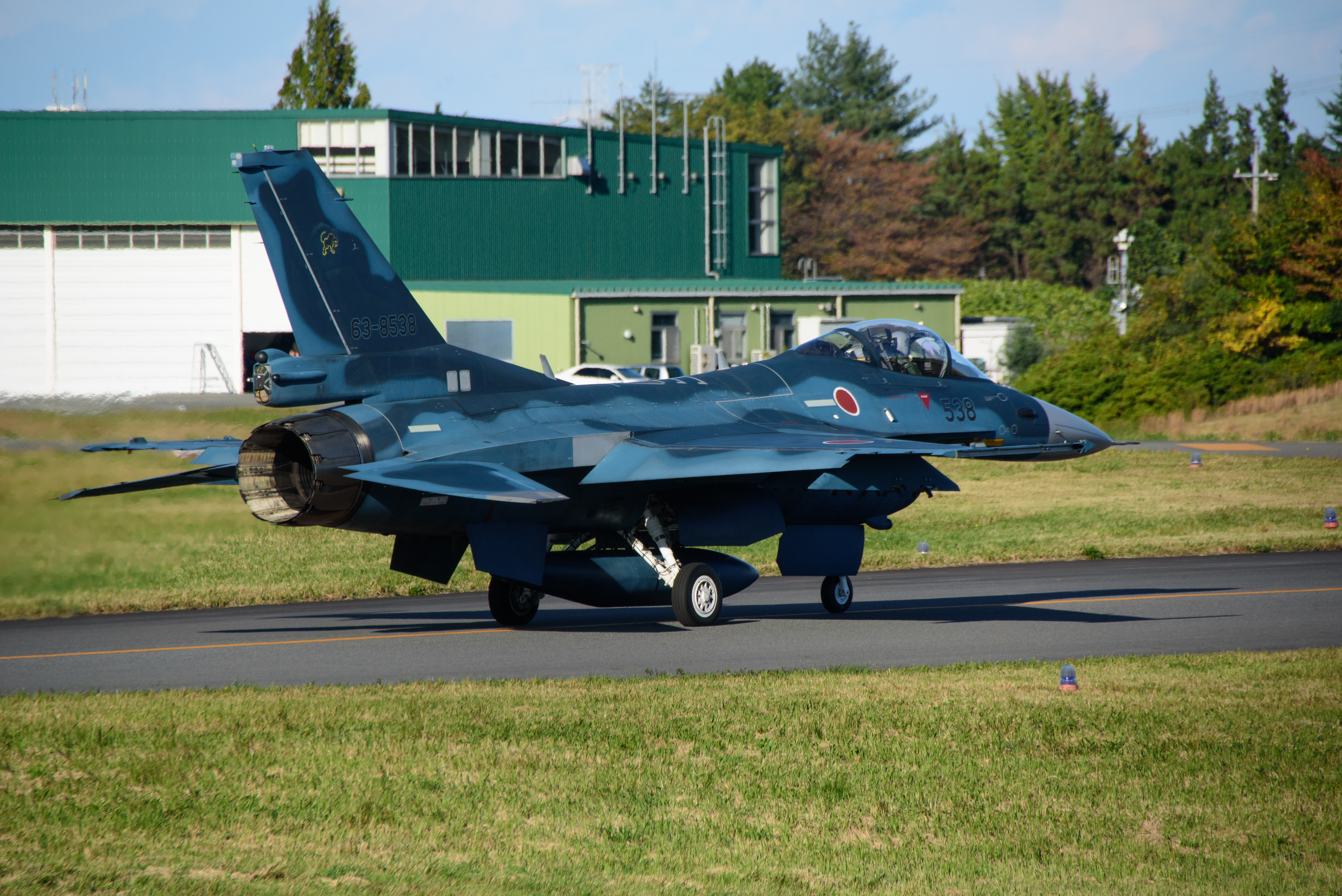 Iruma Air Base Festival 2015